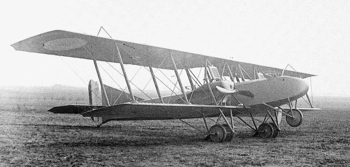 Vue d'ensemble d'un avion biplan Letort dans un champ d'aviation à Dugny (Seine-Saint-Denis). 1917. Guerre 1914-1918.